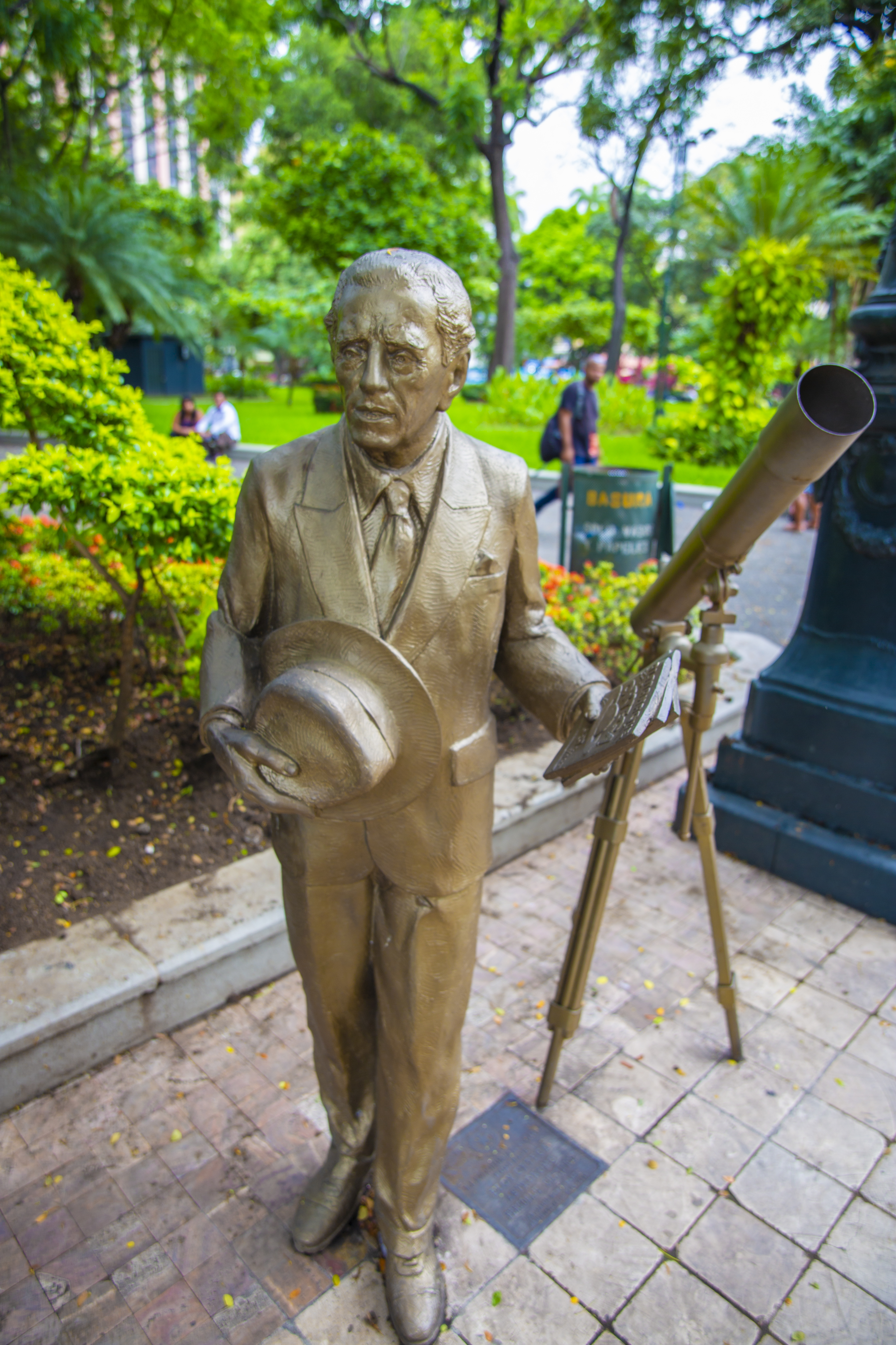 Estatua del astrónomo Eloy Ortega ubicada en el Parque Centenario de Guayaquil desde 2018.